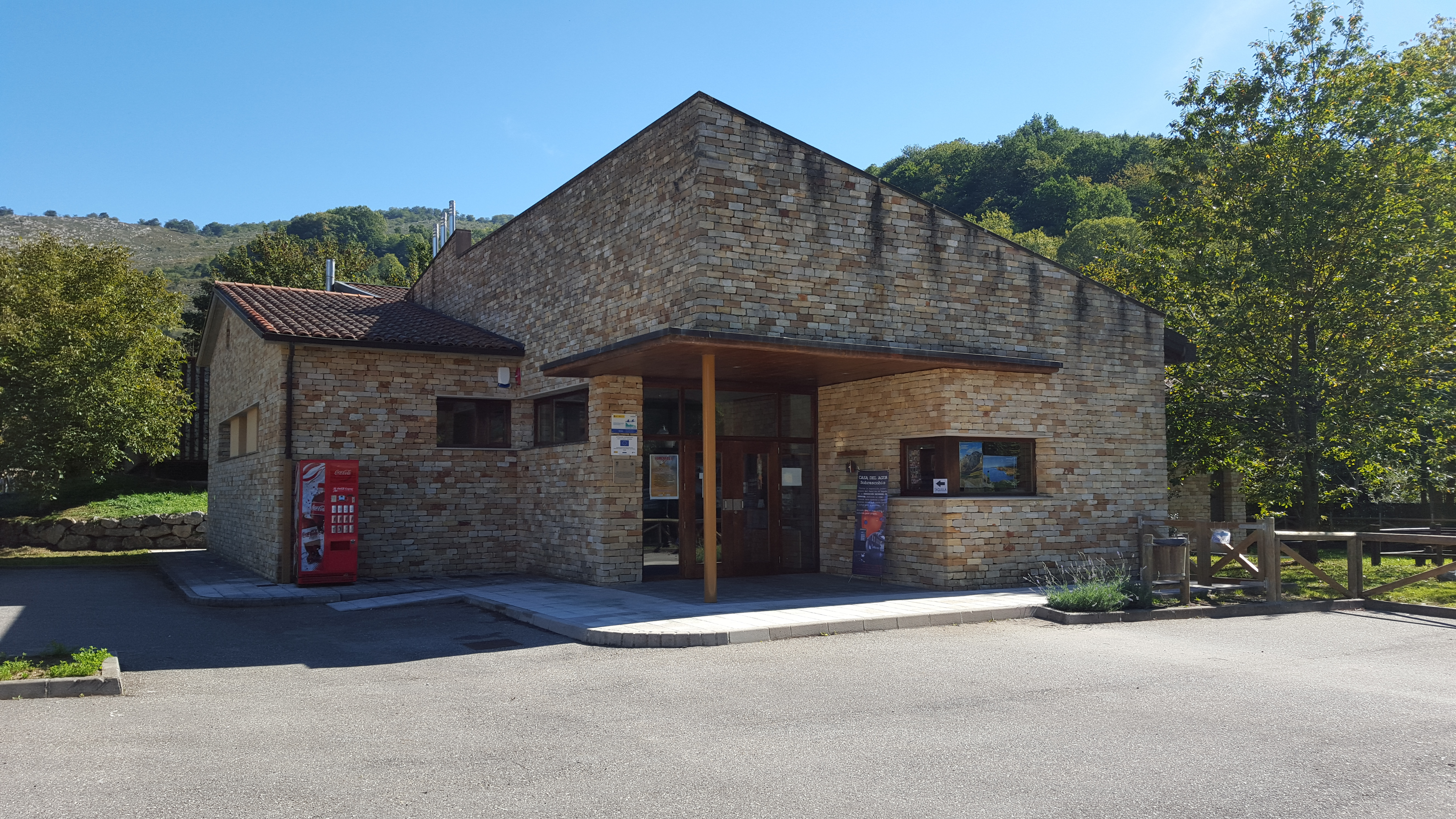 Rioseco, Premio Príncipe de Asturias 2009. Vista de la casa del agua